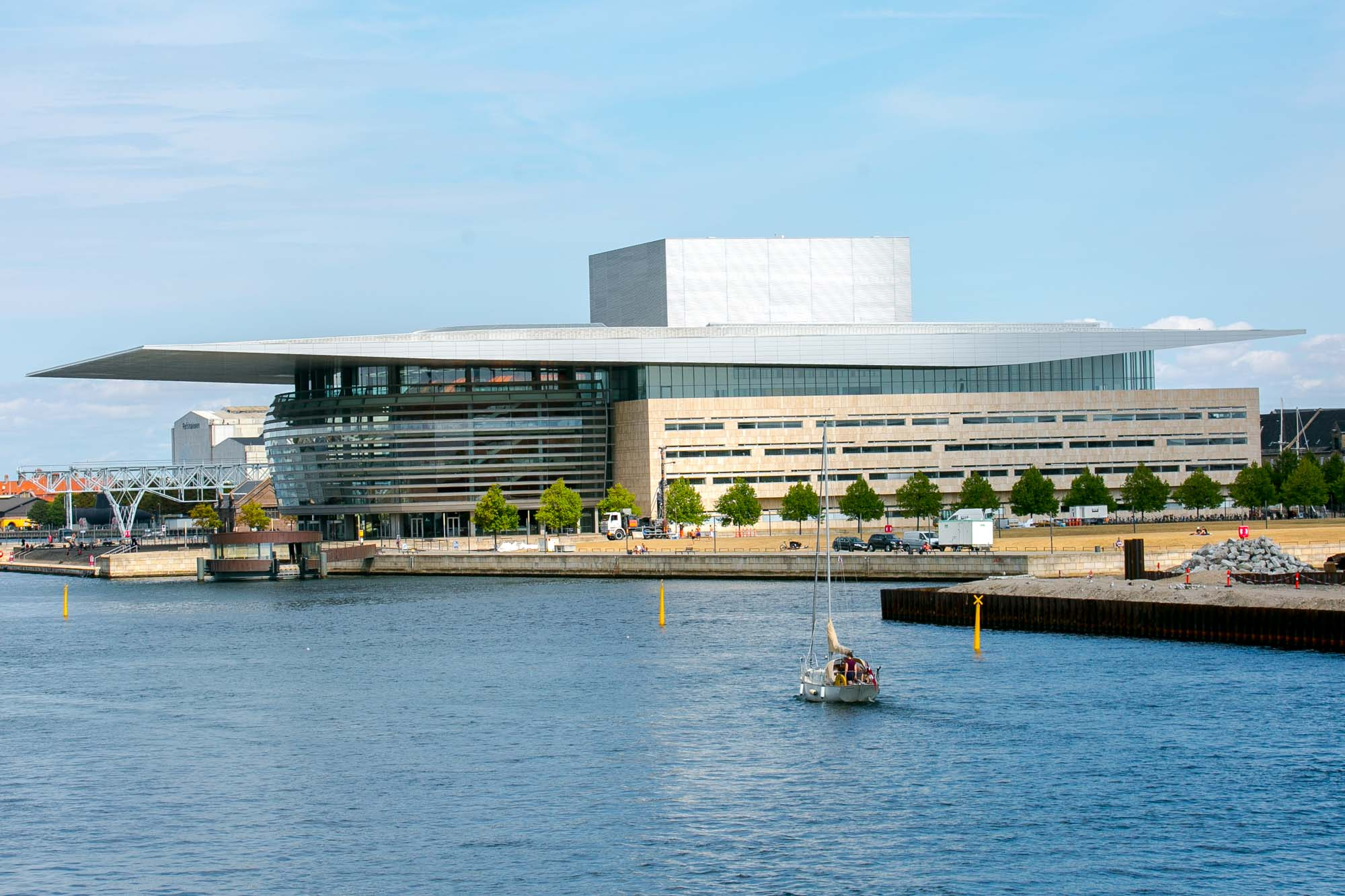 Copenhagen seen during a Viking Sun cruise, August 2018.